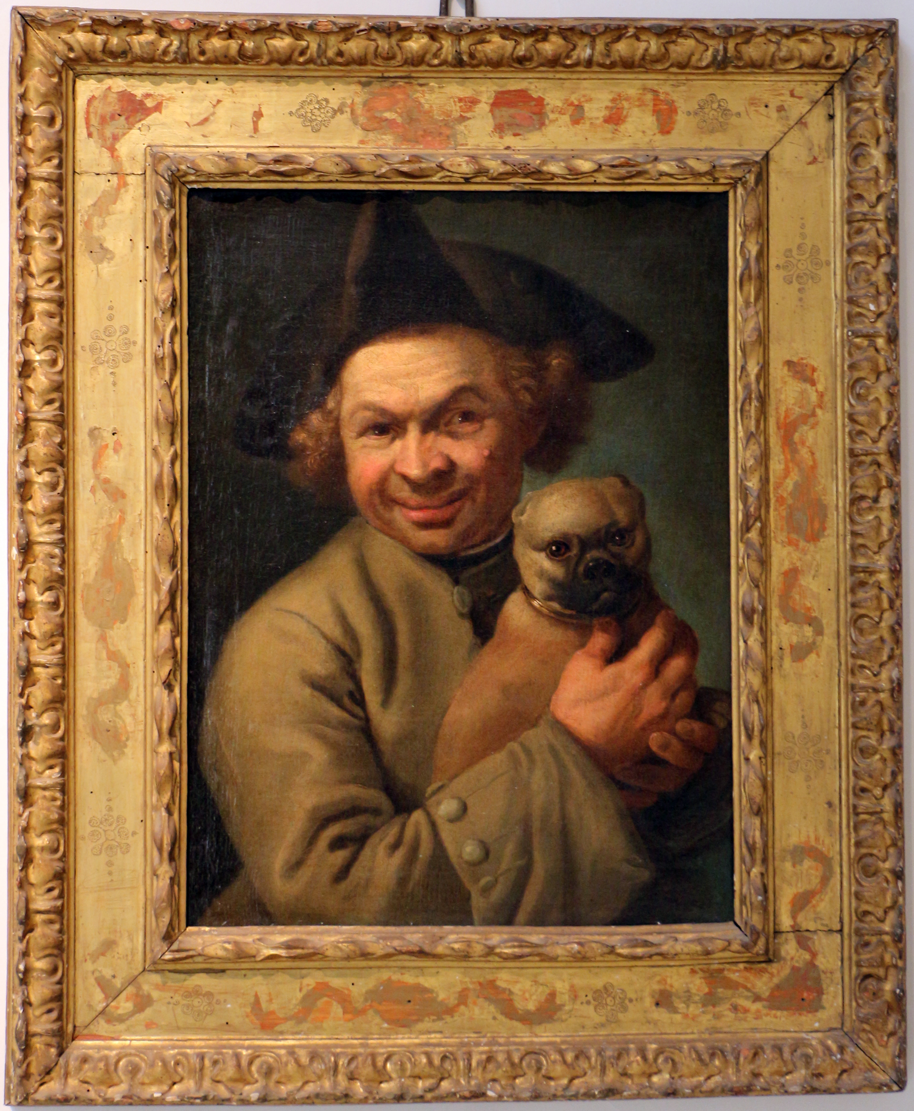 Pinacoteca Nazionale di Bologna This is a photo of a monument which is part of cultural heritage of Italy.